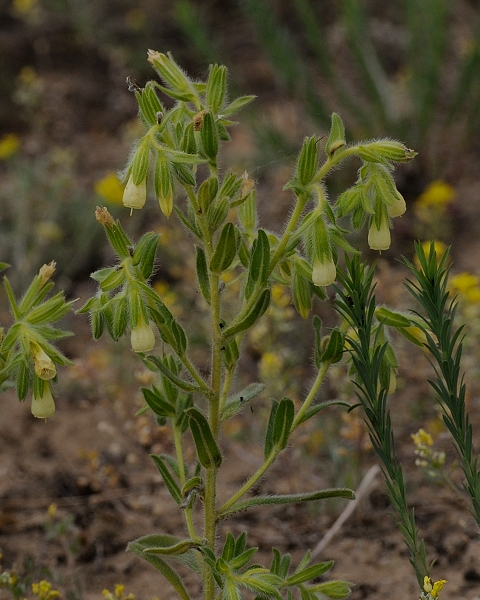 Sand-Lotwurz im Mainzer Sand I, aufgenommen am 06.01.2014